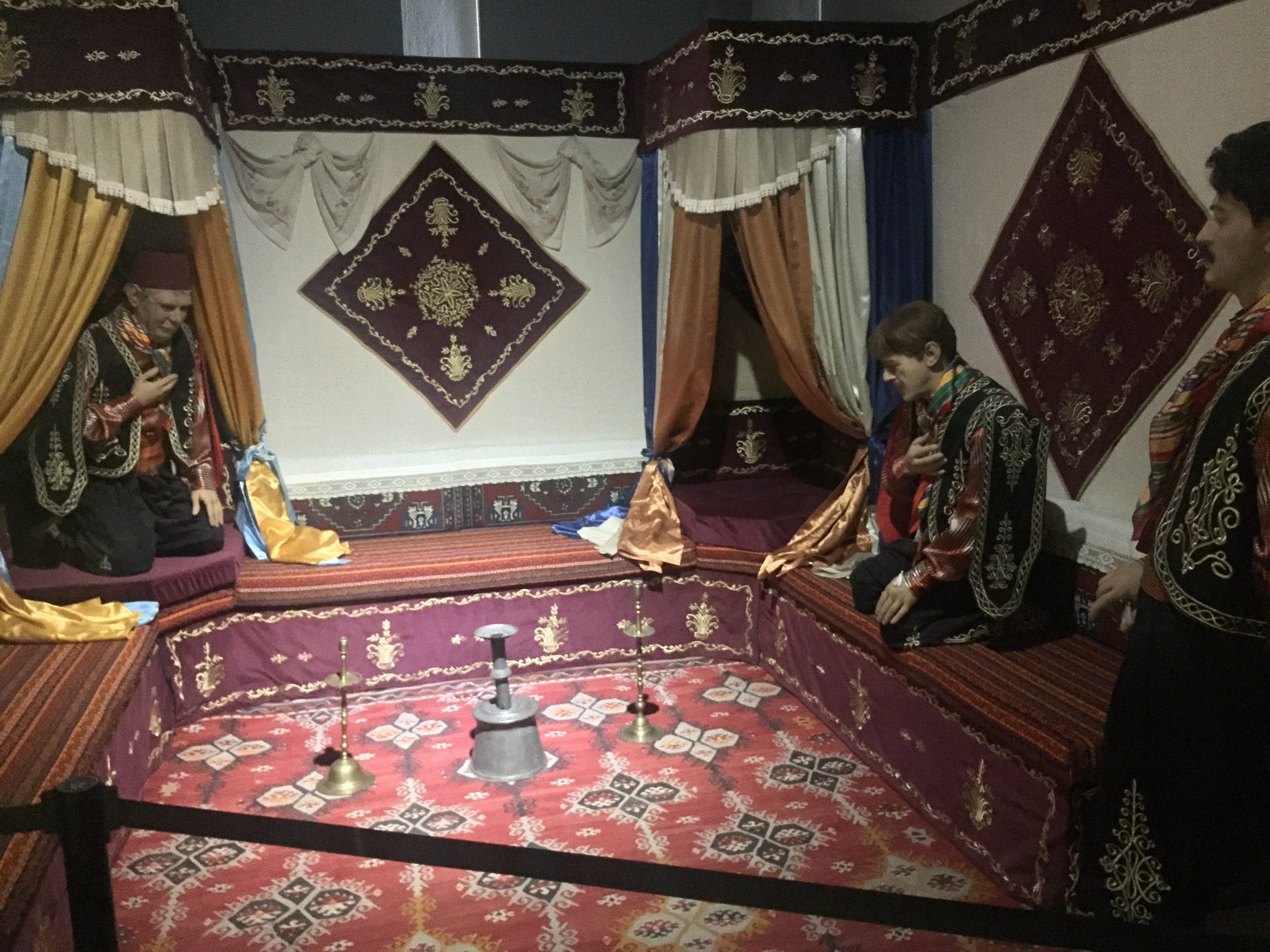 Çankırı Müzesinde yaran kültürünü betimleyen bir canlandırma.